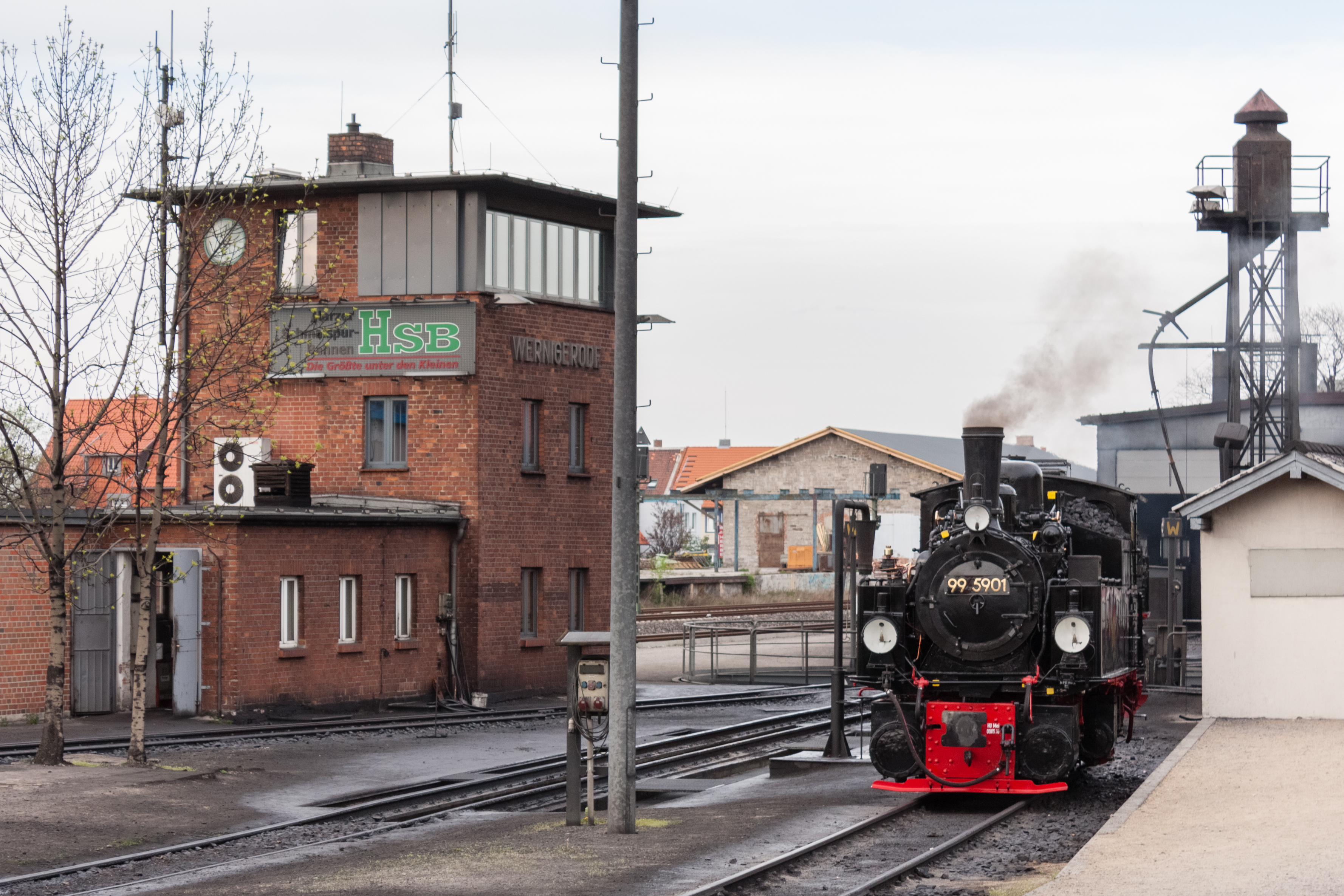 99 5901 in Wernigerode